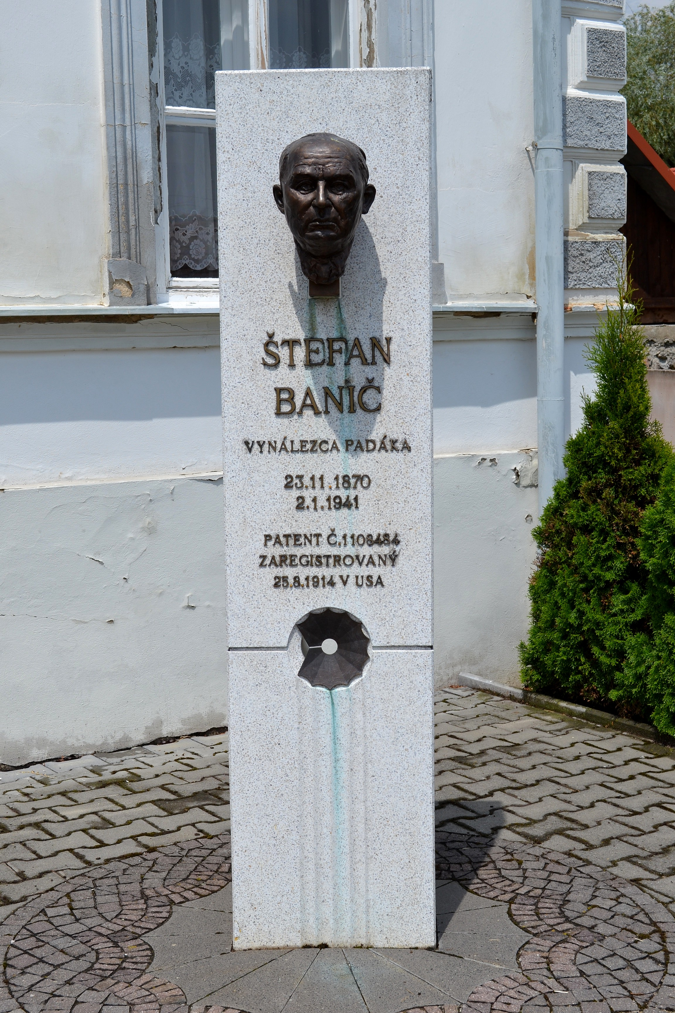 Busta vynálezcu Štefana Baniča, smolenického rodáka, pred budovou kultúrneho domu. Odhalili ju v roku 2006